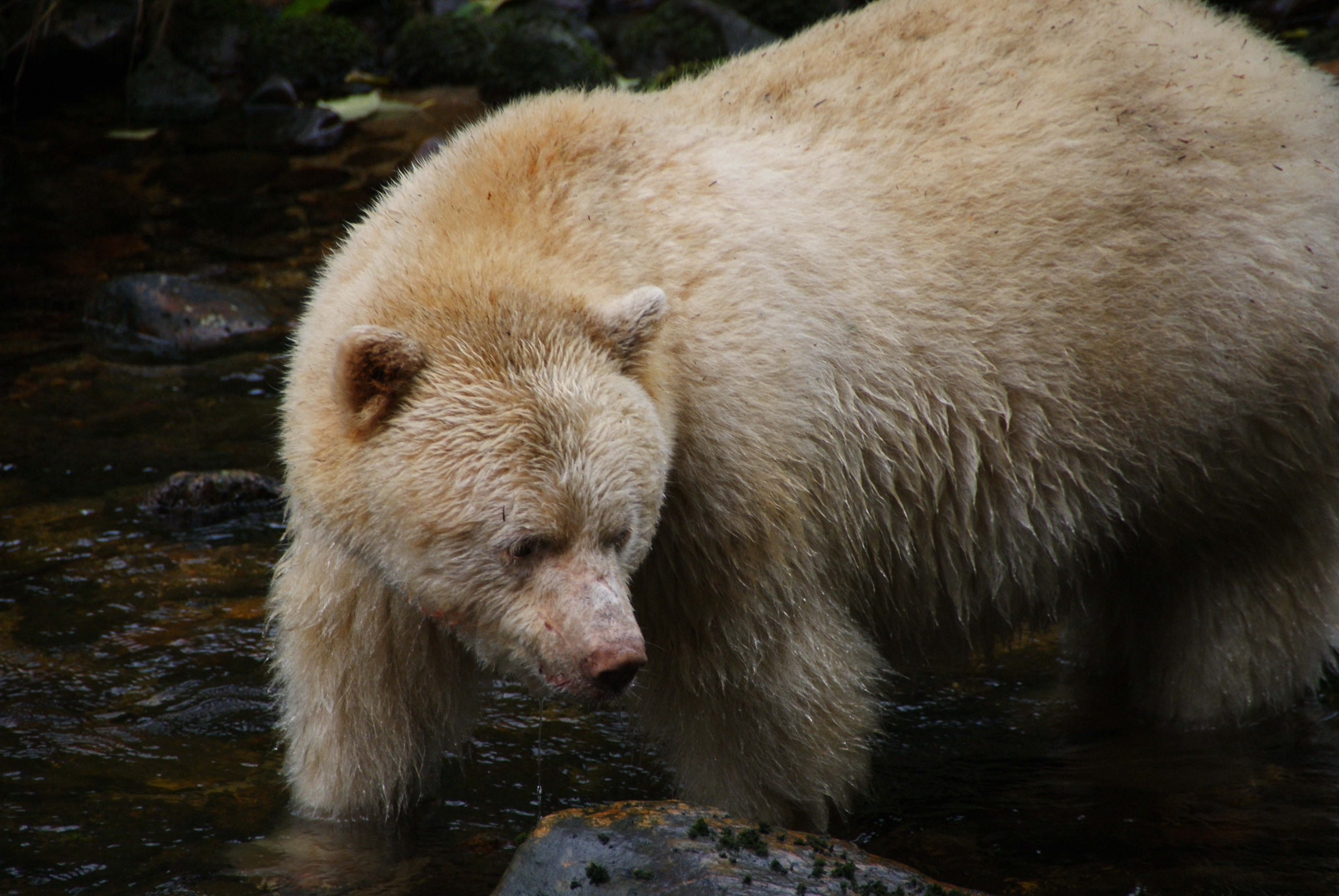 Ursus americanus kermodei, Spirit Bear Lodge, Klemtu, BC.